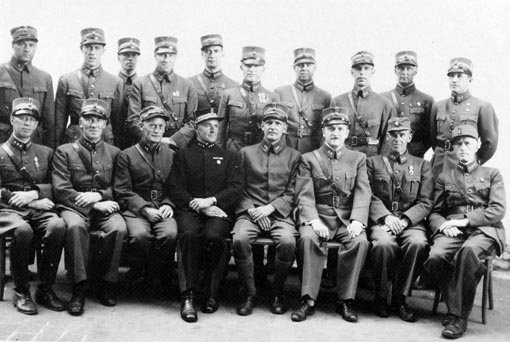 Gruppe 18: norske offiserer i militæruniform, Schildberg fangeleir i Polen under 2. verdenskrig, krigsfanger, nr. 2 fra venstre: Kaptein Knut Stai (1898-1986), nr 4 fv: kaptein Teodor Koller fra Ringsaker. (Fjeld)